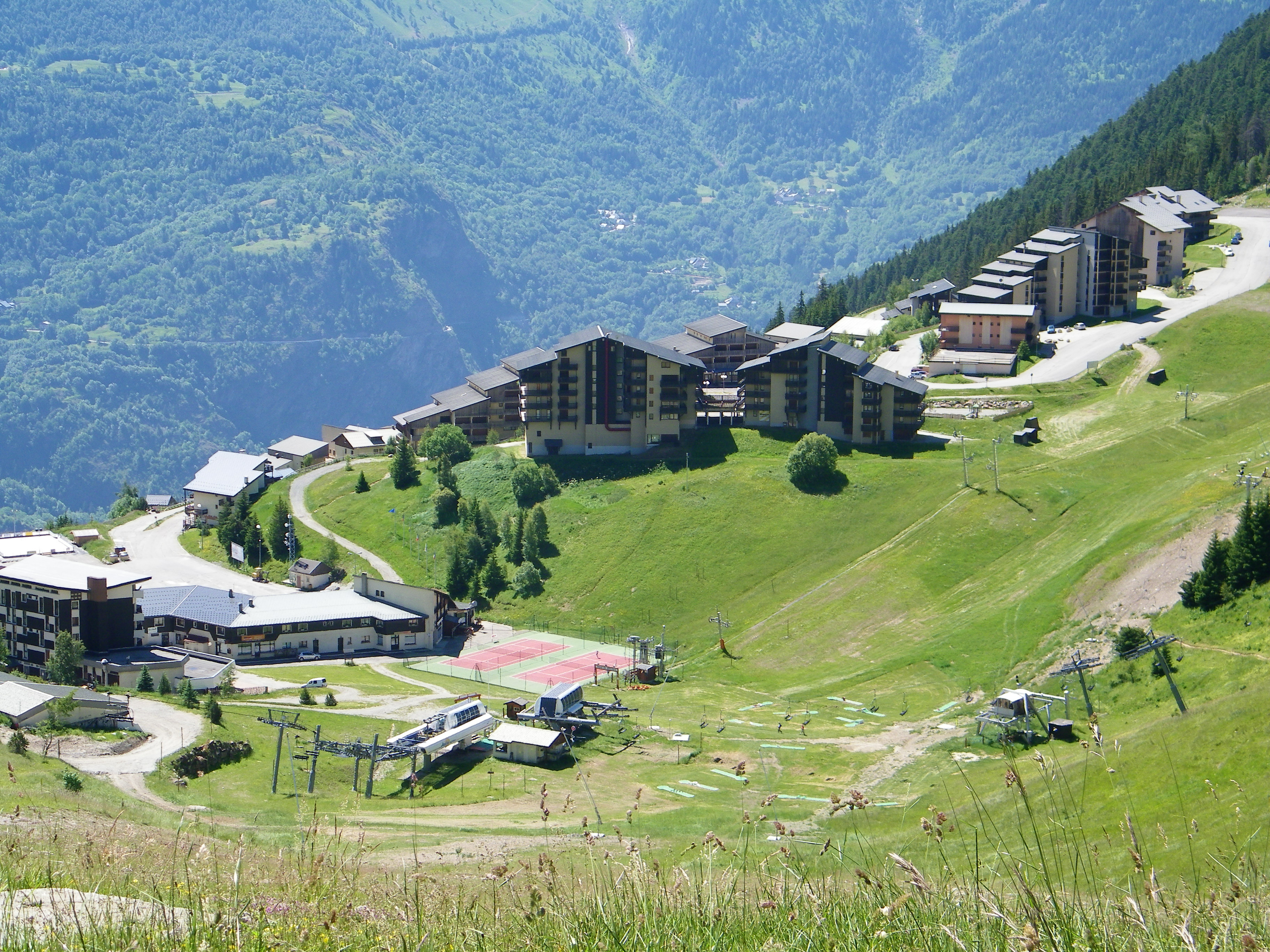 Photographie de la station d'Auris en été.